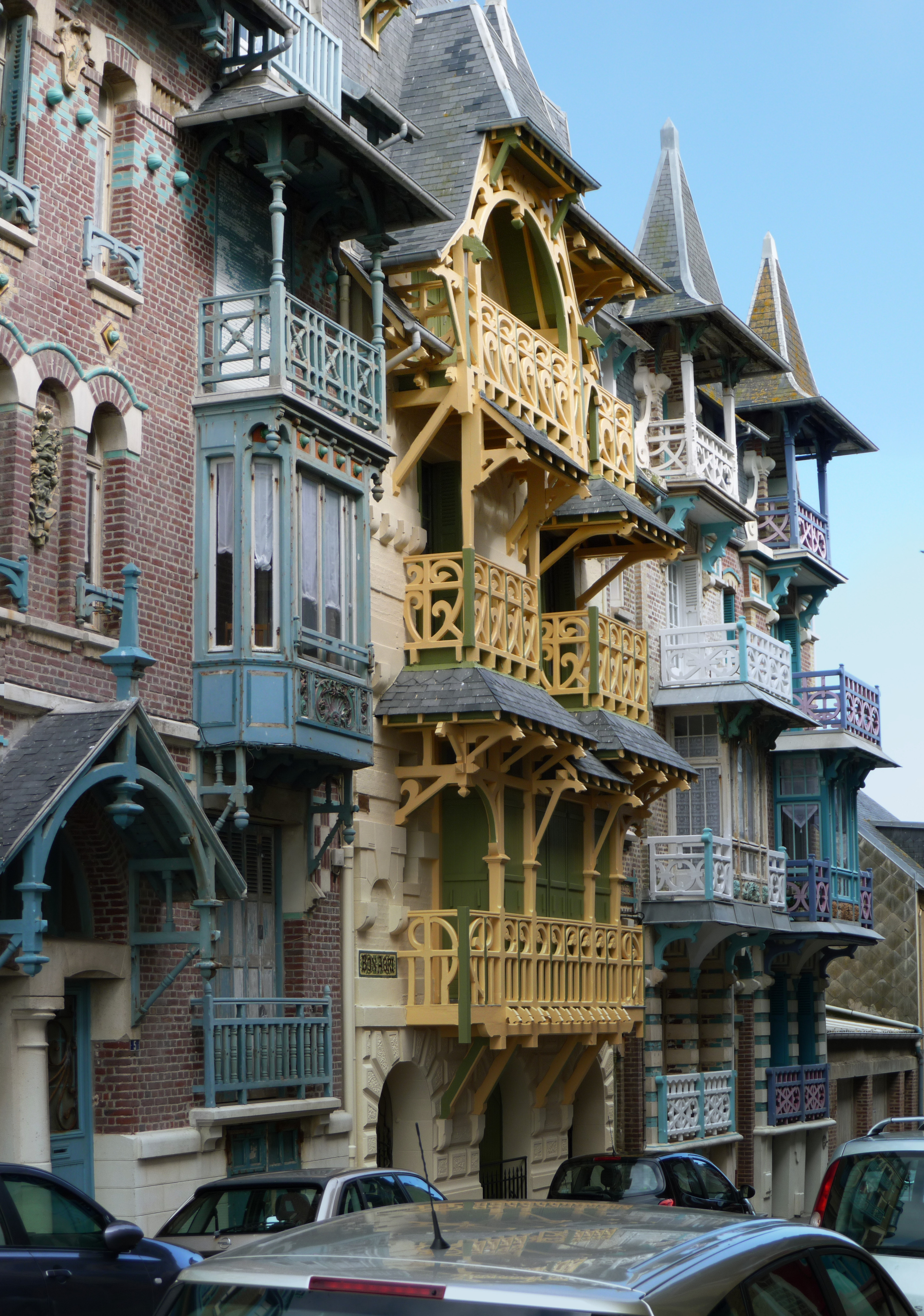 Mers-les Bains 05